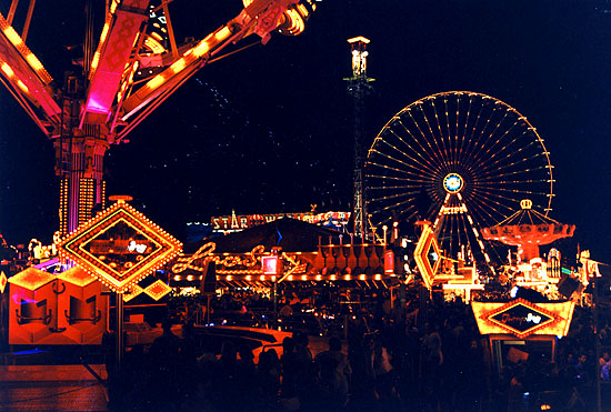 Annakirmes 1999